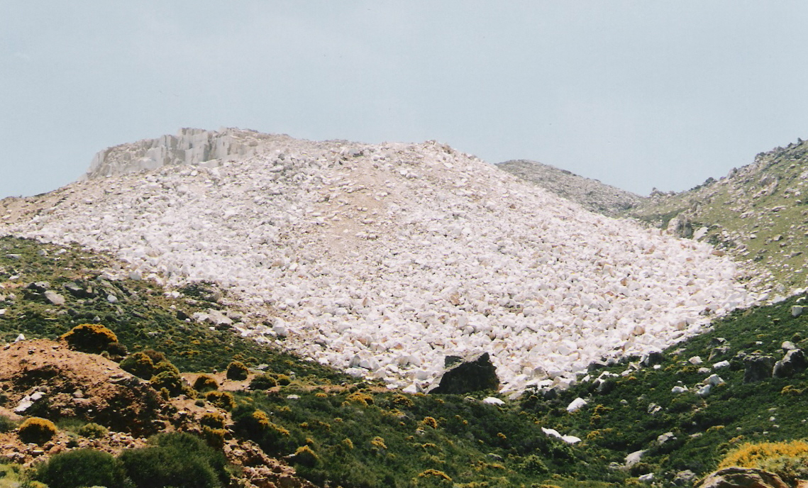 Marmorsteinbruch auf Naxos